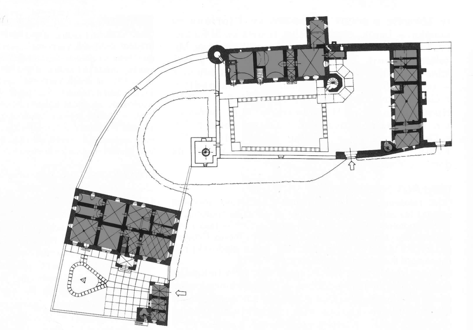 Půdorys Zámků Benešov nad Ploučnicí